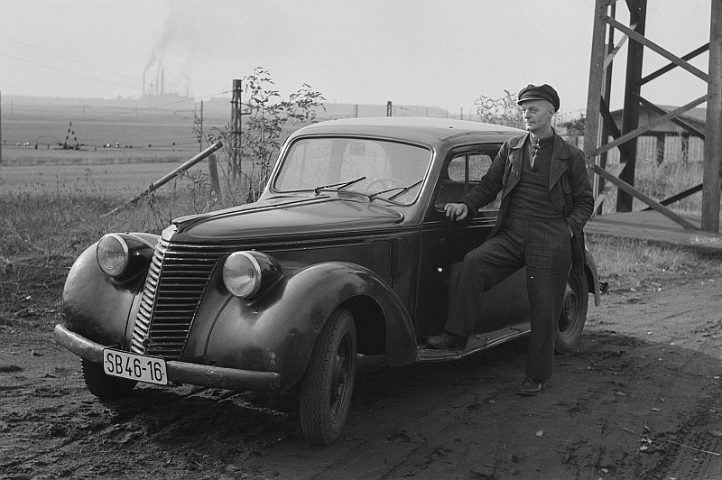 Original image description from the Deutsche FotothekPortrait eines Mannes neben einem PKW